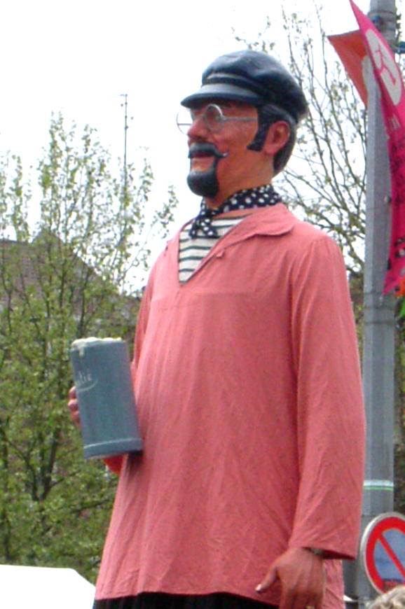 Le géant Raoul de Godewarsvelde